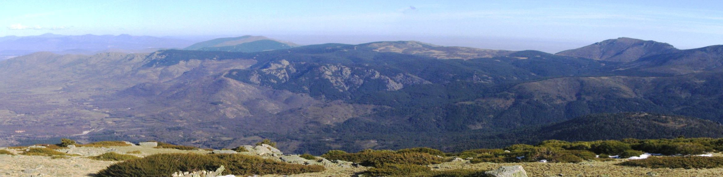 Sierra de la Morcuera (Comunidad de Madrid, España).